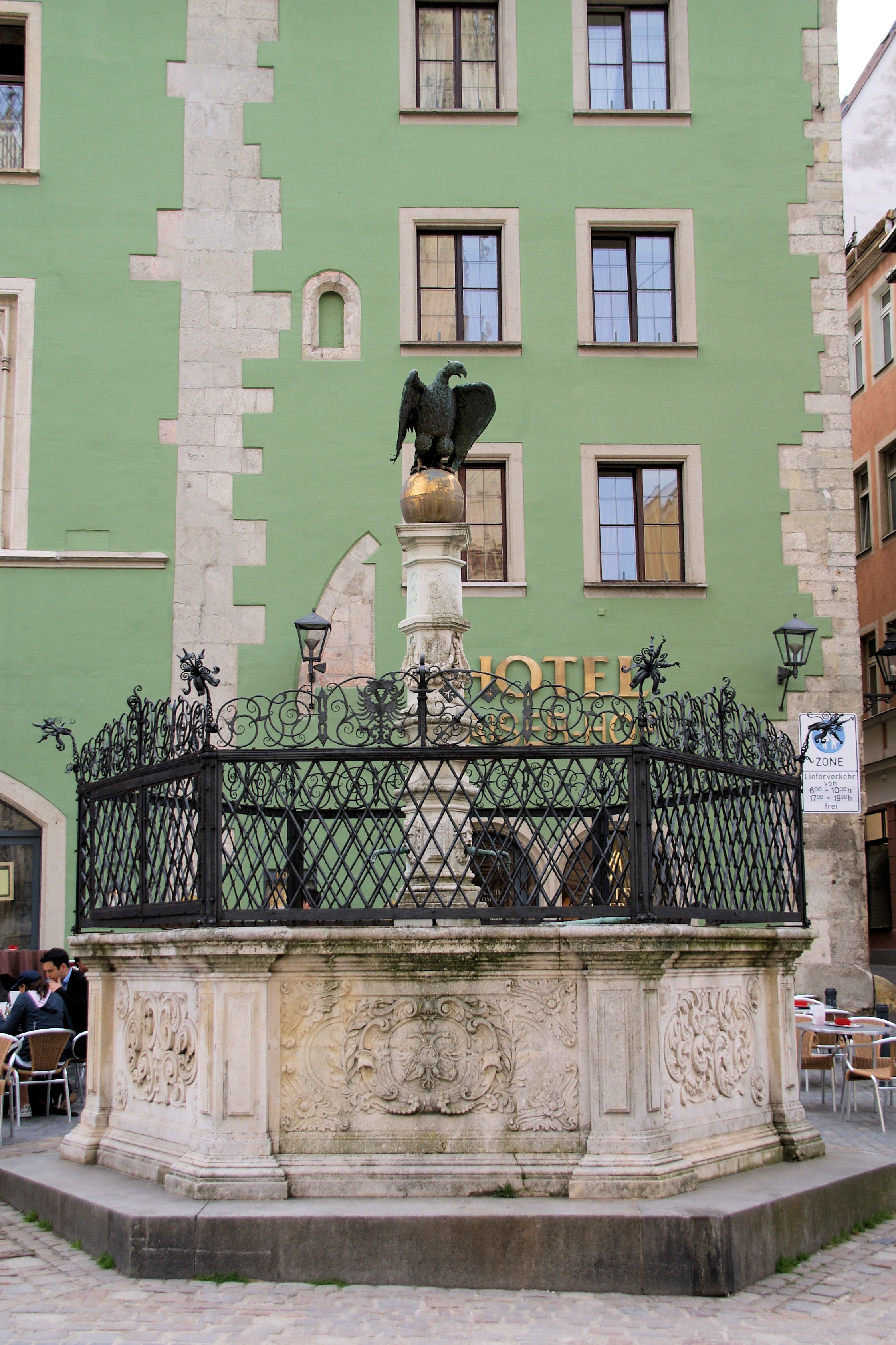 Adlerbrunnen, achteckiges Becken und Brunnenstock mit Bronzeadler, Renaissancedekor, 1566, mit Ziergitter von 1592 This is a photograph of an architectural monument.